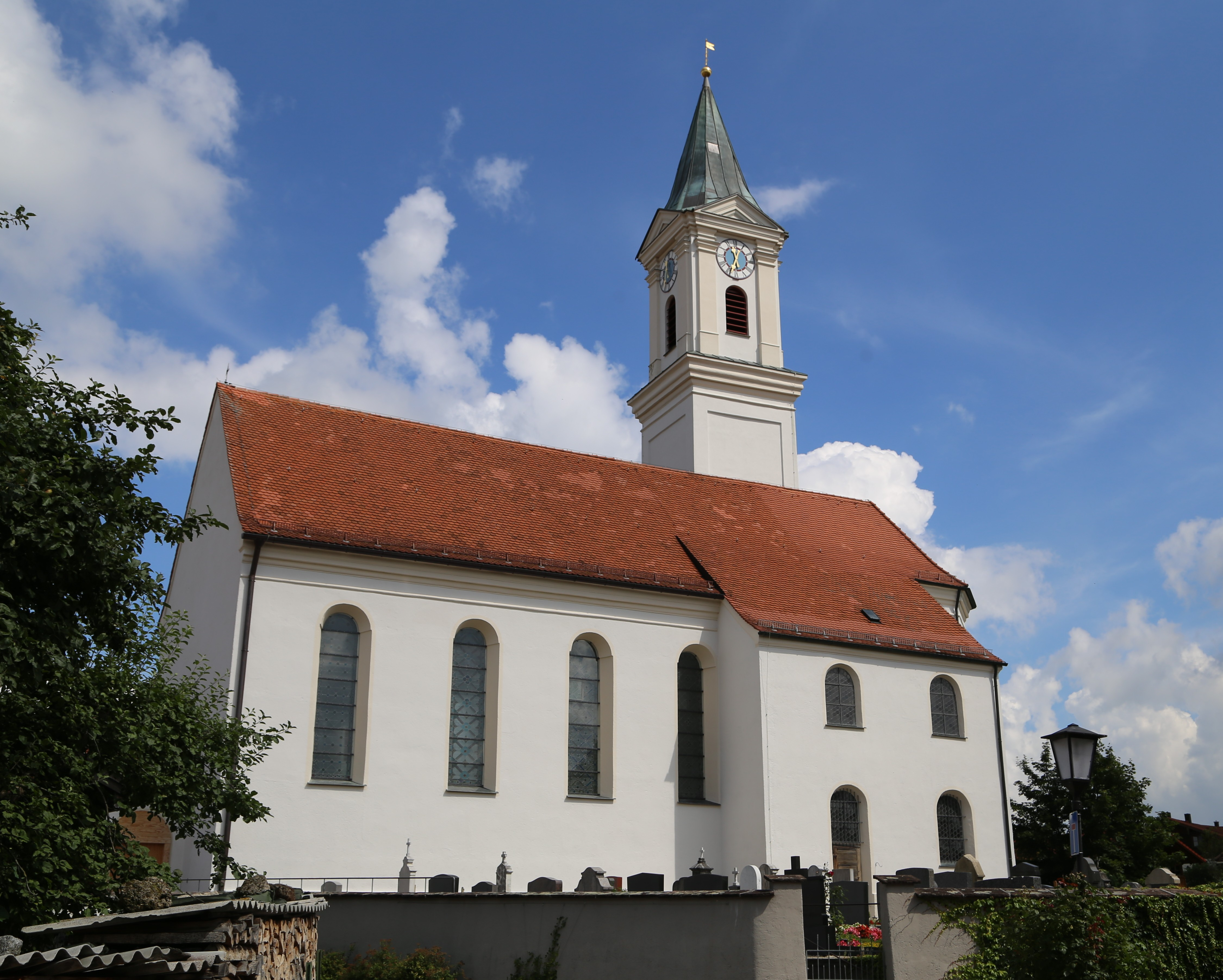 Mariä Himmelfahrt, Schönau, Tuntenhausen; Saalbau mit eingezogenem Chor und Spitzturm, barocker Neubau unter Einbeziehung des mittelalterlichen Turmunterbaus und der Umfassungsmauern des Chores, Weihe 1723, Turmobergeschoss 19. Jh.; mit Ausstattung.